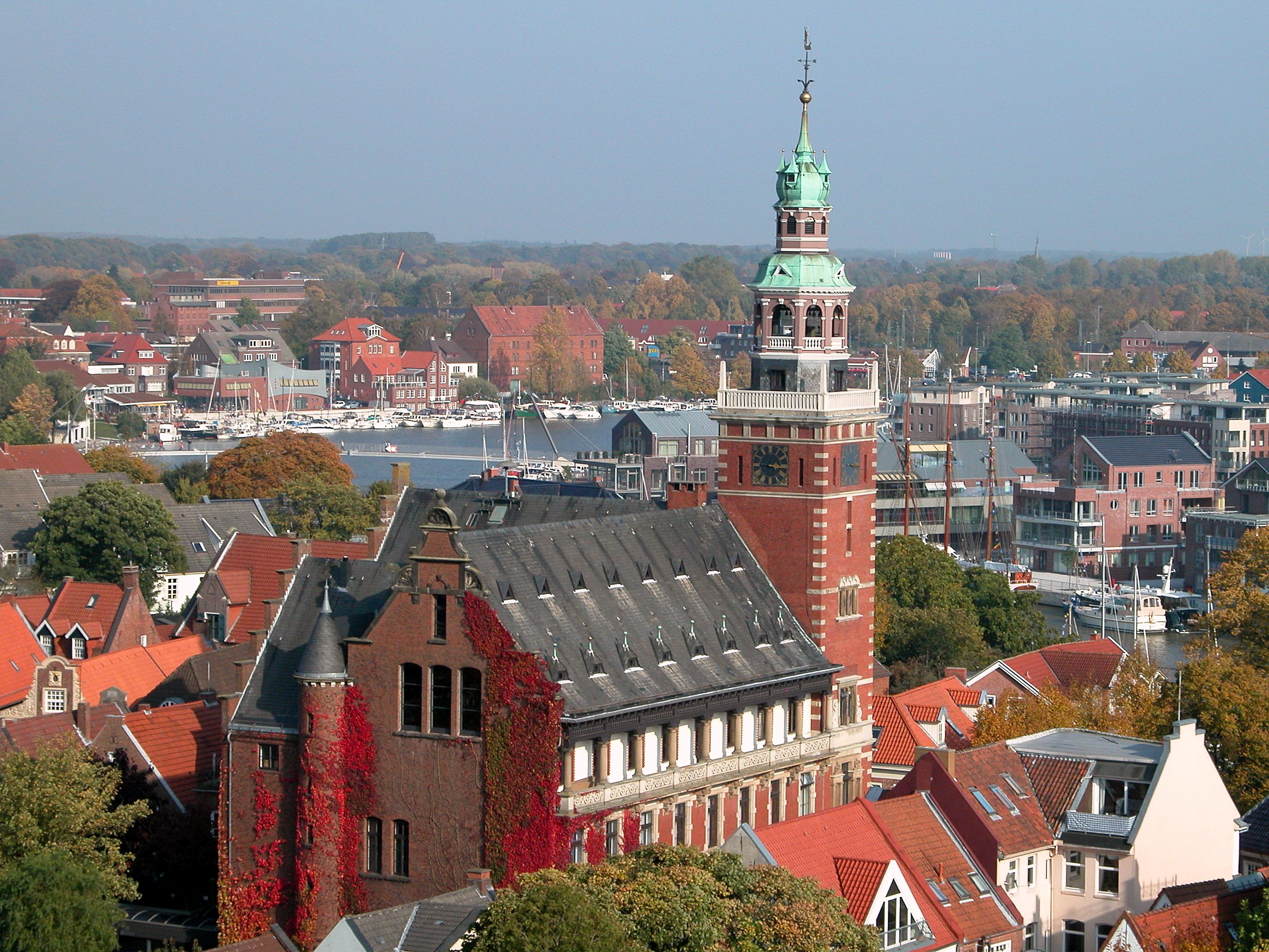 Leeraner Rathaus mit Hafen im Hintergrund.